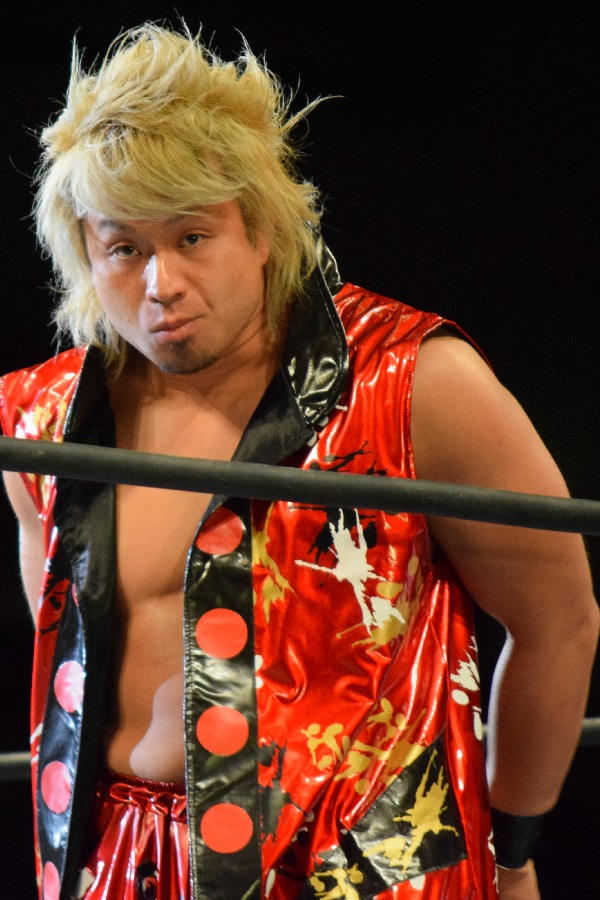 2017年3月12日 ベイコム総合体育館 「NEW JAPAN CUP 2017」 YOSHI-HASHI